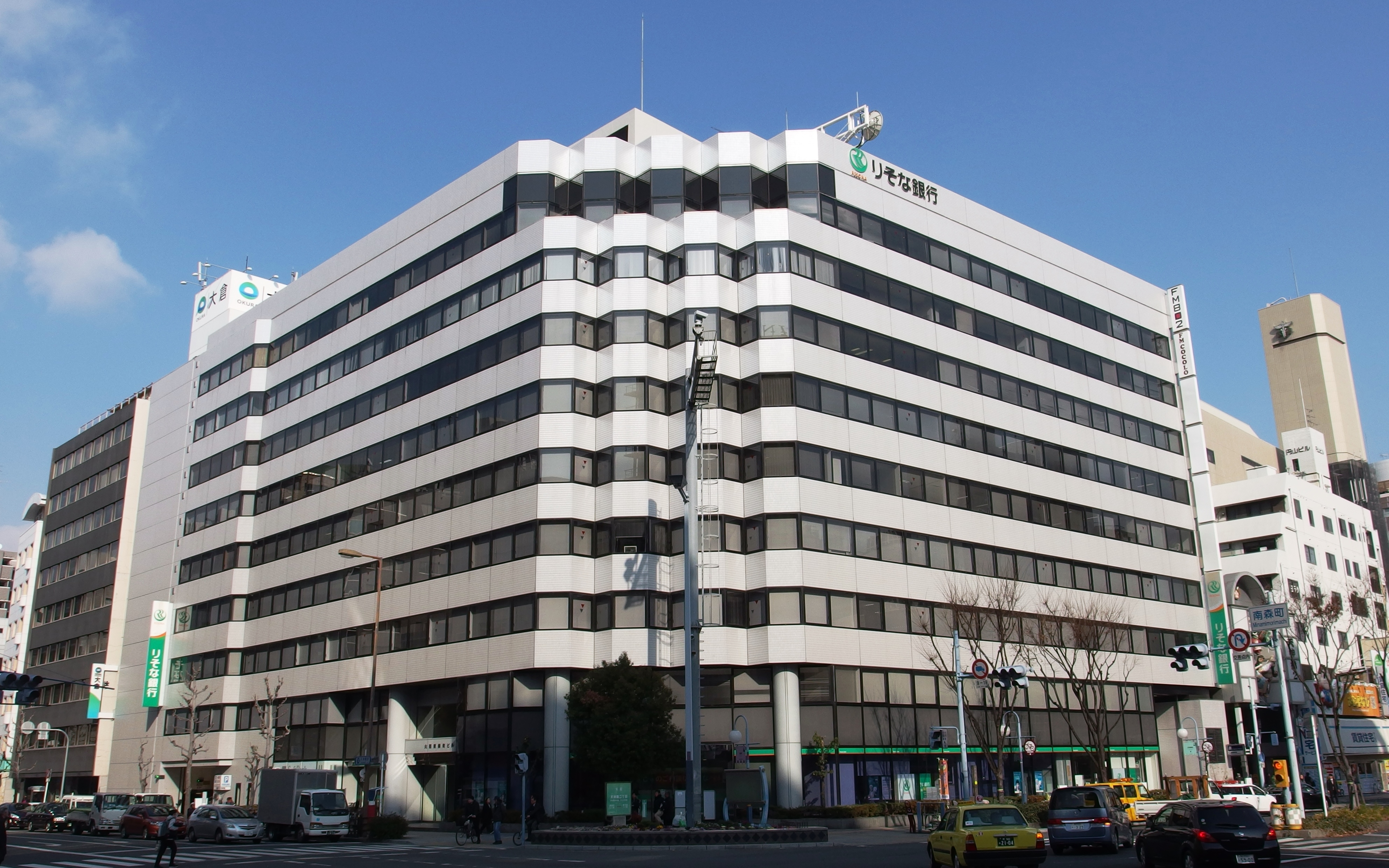 りそな銀行南森町支店を構える大和南森町ビル。上層階にはFM802とFM COCOLOが入る。屋上のパラボラアンテナは飯盛山送信所へ向けられている。